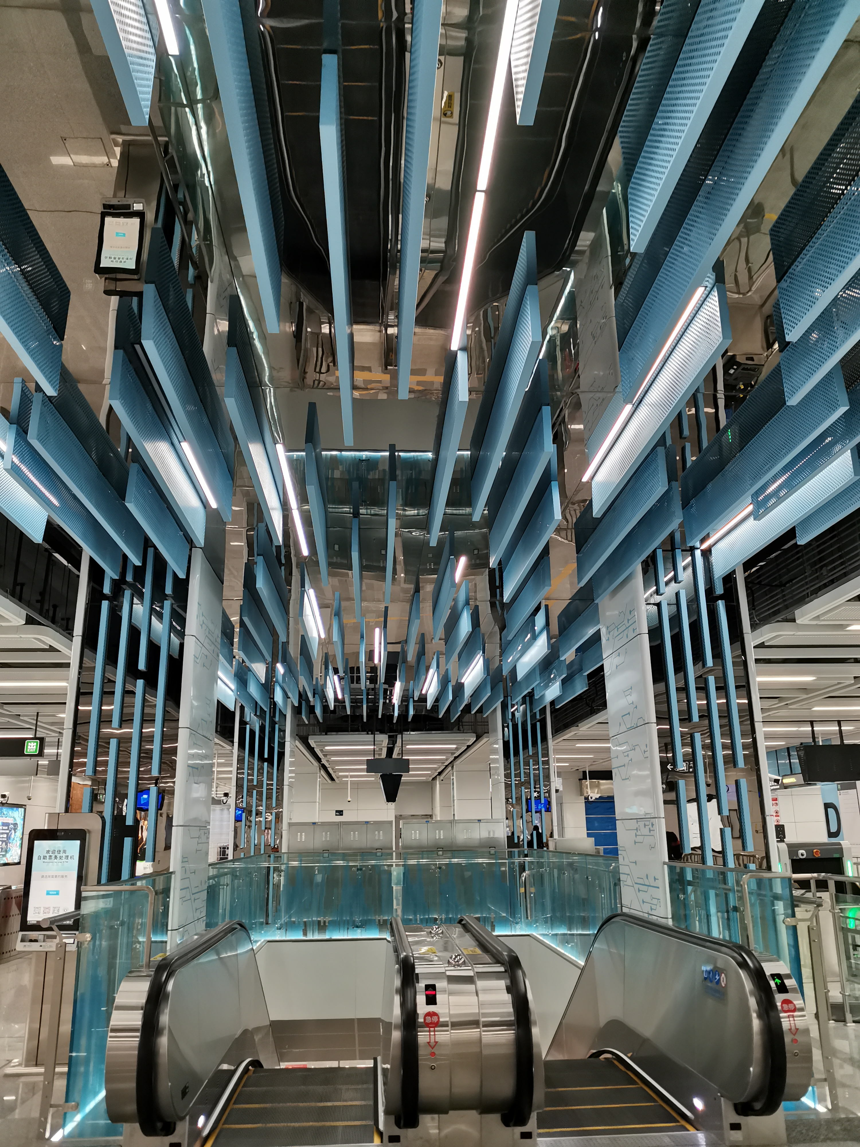 梦海站扶梯口